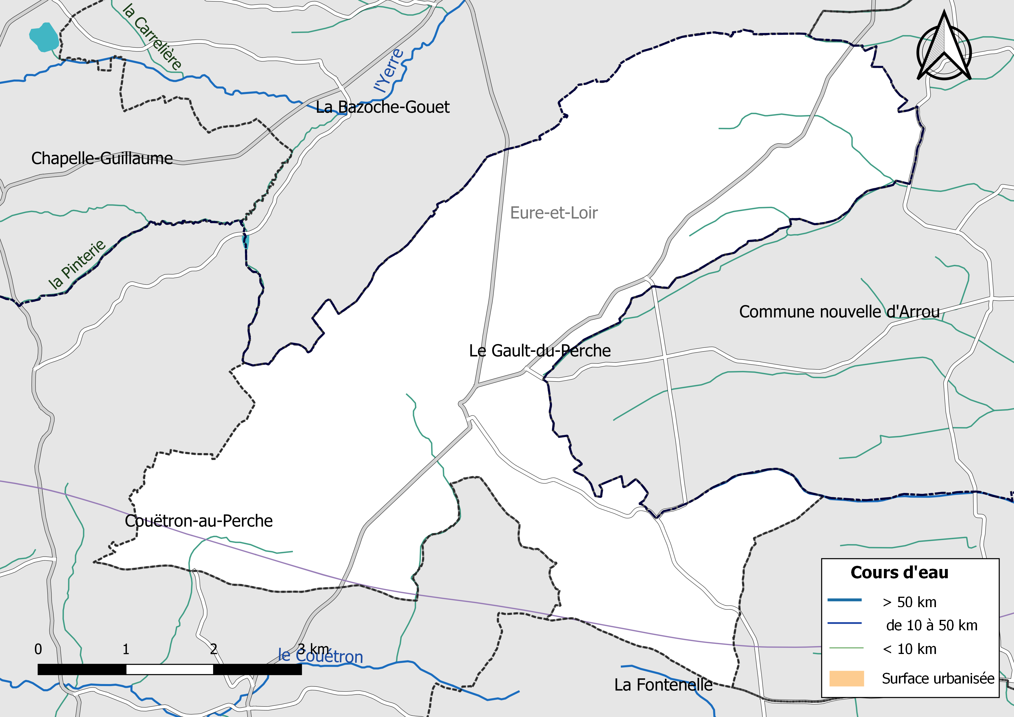 Carte du réseau hydrographique de la commune de Le Gault-du-Perche (France).